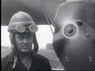 A.N.J. Thomassen à Thuessink van der Hoop, piloot op de eerste intercontinentale vlucht van Schiphol naar Batavia.